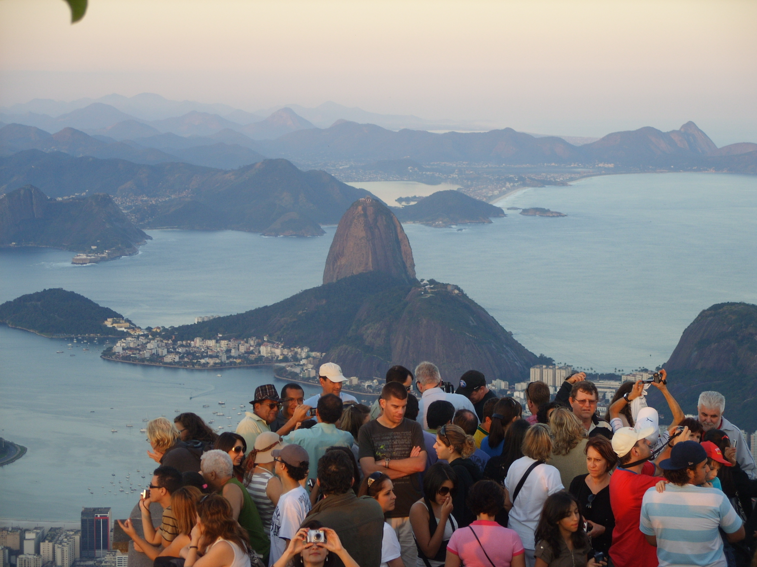 Visitação do Cristo Redentor em Julho